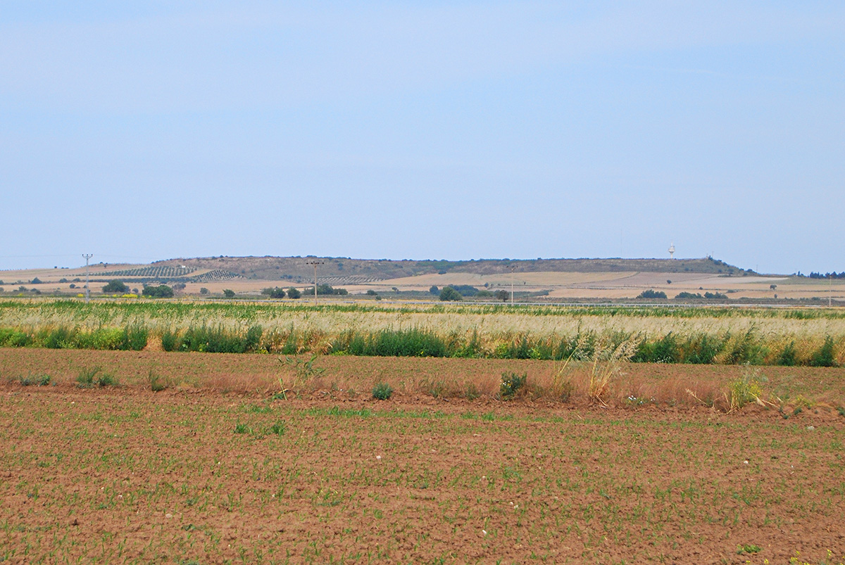 Άποψη του Σίγειου (σήμερα Γενισεχίρ) κατά το έτος 2014